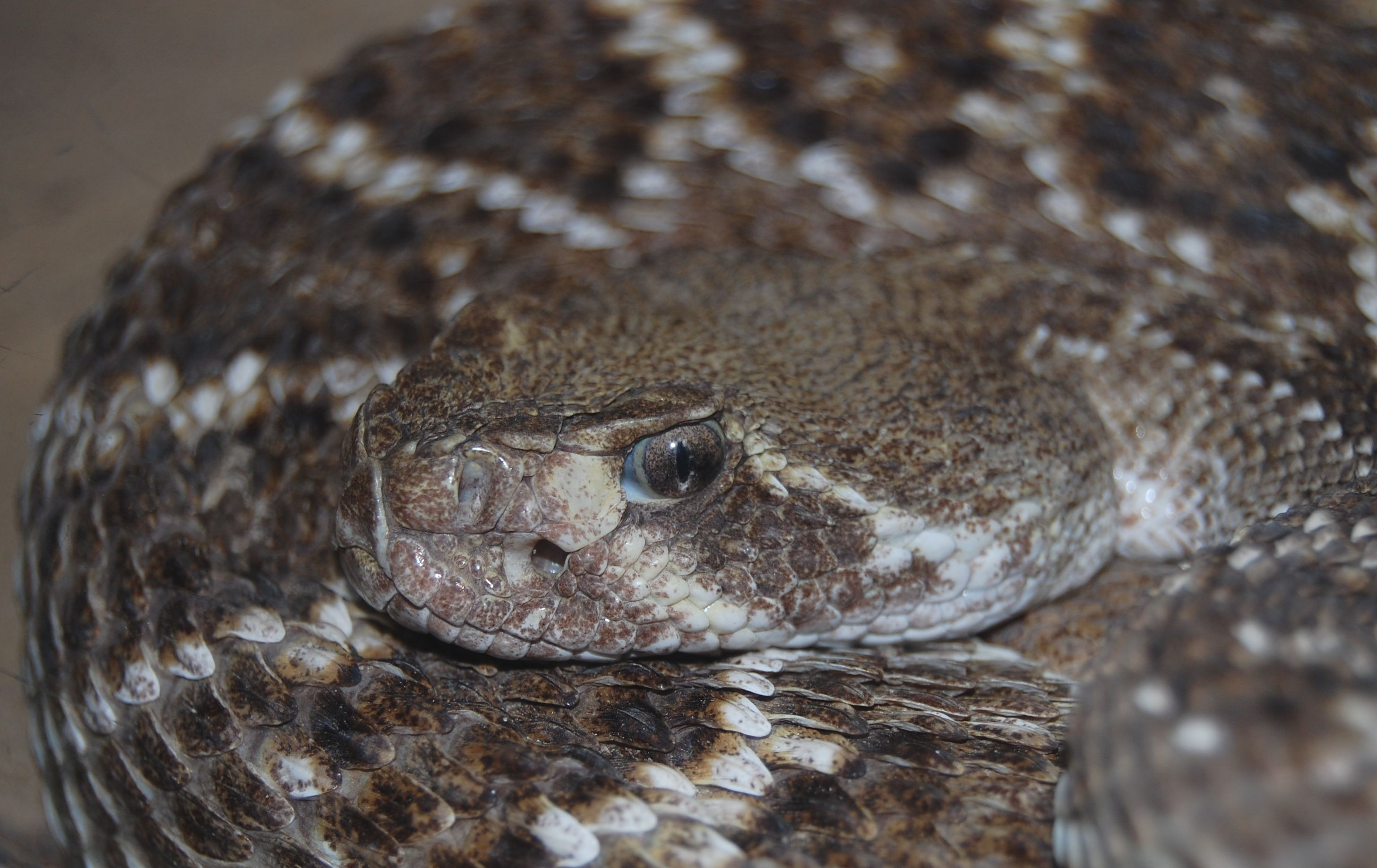 Crotalus atrox, portrait